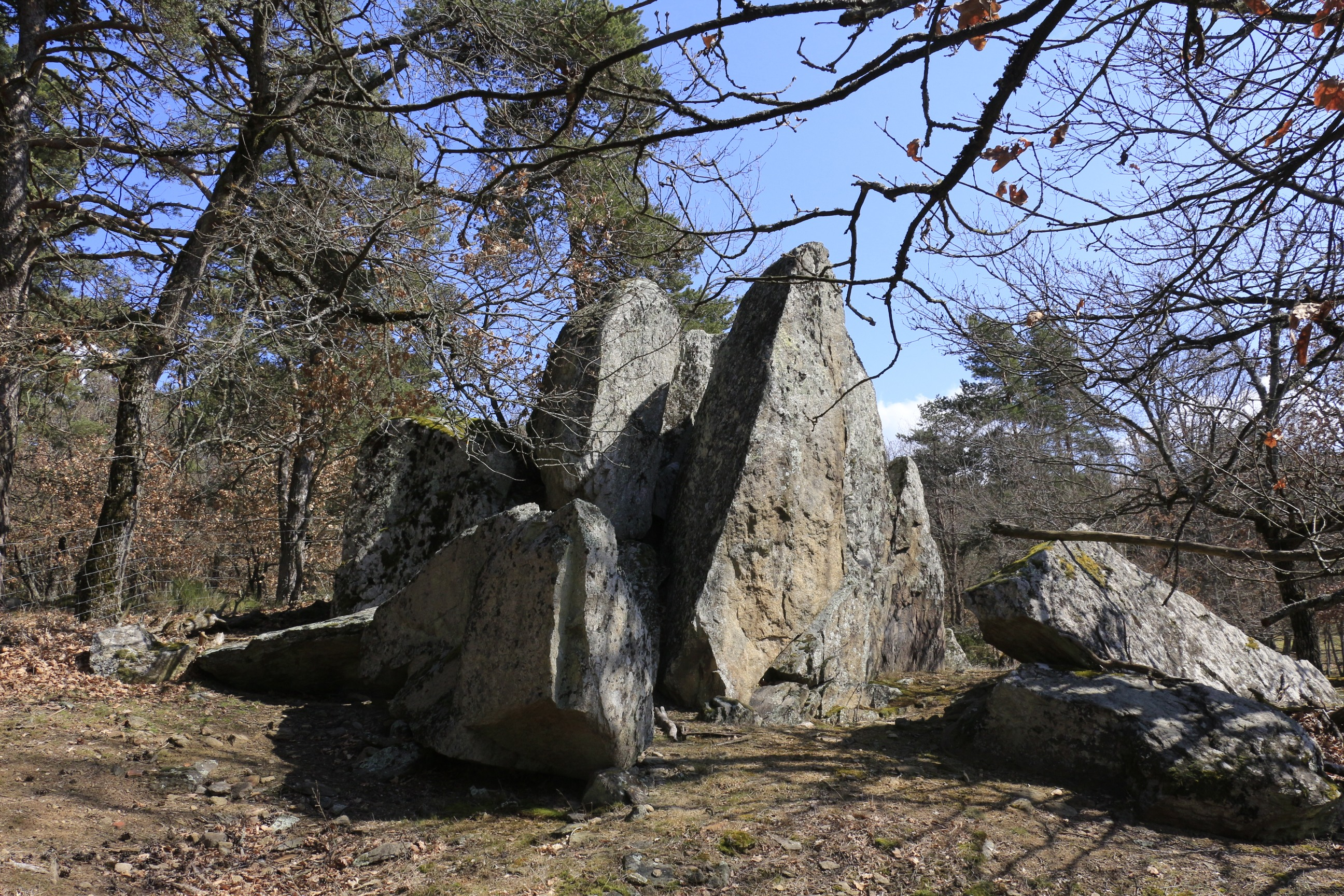 Menhir "Roche Seule" à Laveudieu(43) en France